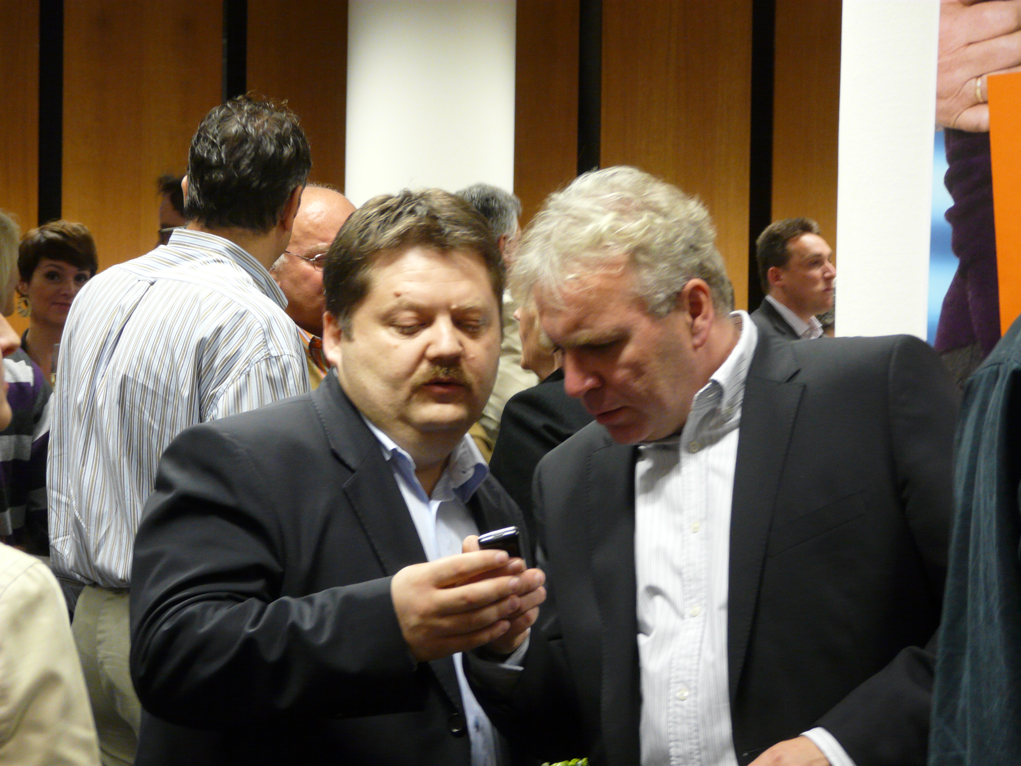 2010 április 11 -én a FIDESZ 2/3 -os választási győzelmét ünnepelte. Szász Jenő, Pokorny Zoltán. A felvétel megjelent Creative Commons alatt a Metapolisz DVD sorozatban.